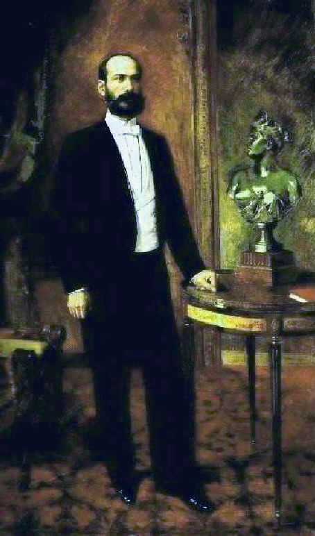 Manuel Antonio Matos. 1895. Oleo sobre tela. 229 x 150 cm. Coleccion privada de Carmen Luisa Perez Matos de Sardi.